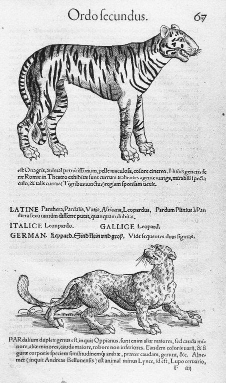 Illustrations de Icones animalium quadrupedum viviparorum et oviparorum..., vol. I